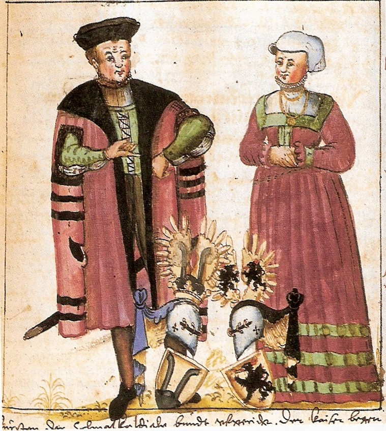 Das Bild zeigt den Ortenberger Amtmann Philipp Eisenberger (den 5.) mit seiner ersten Frau Amalia Trechin (Trach)